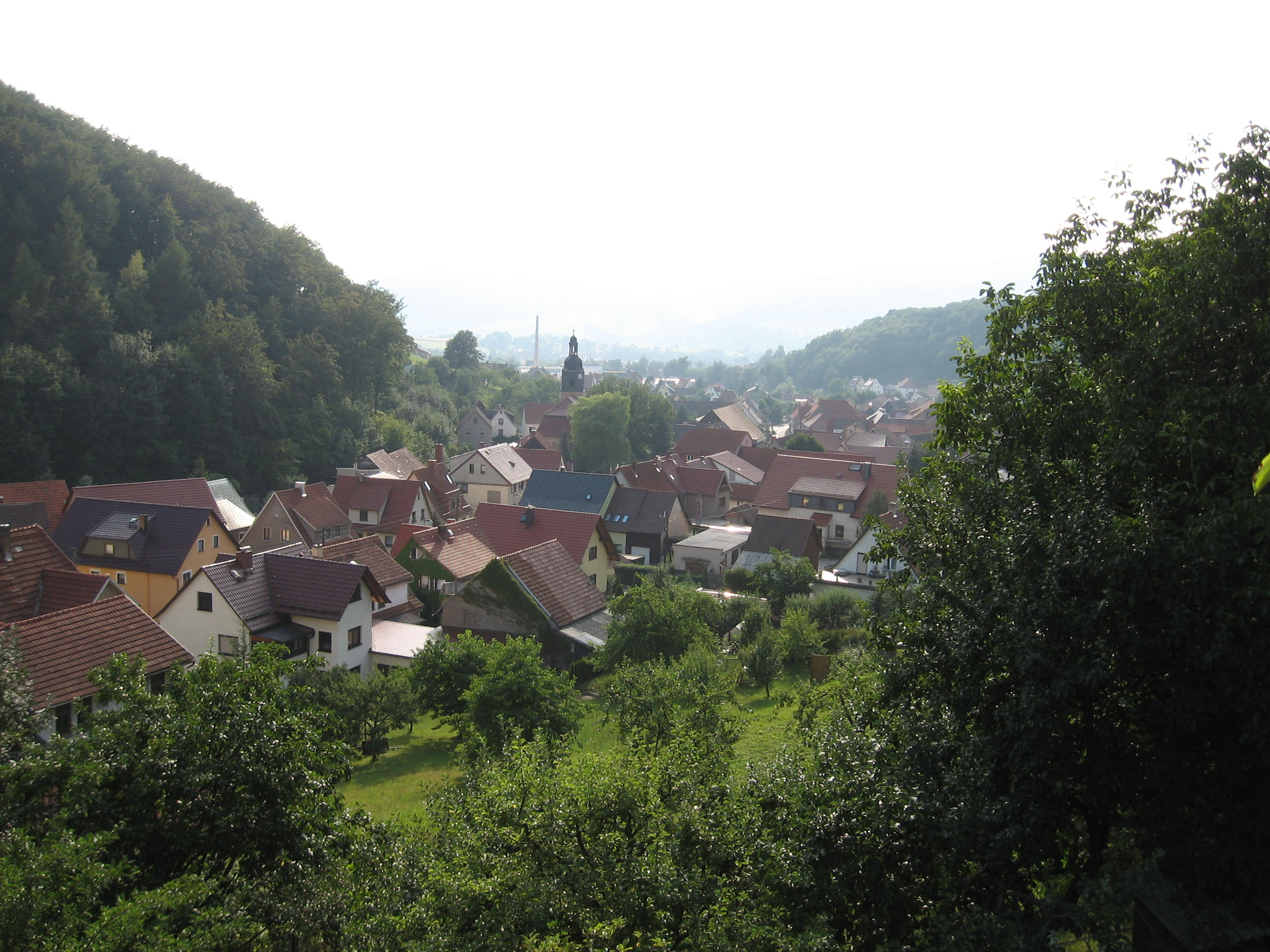 Ortsteil Schnellbach, Floh-Seligenthal, Thüringen, Deutschland